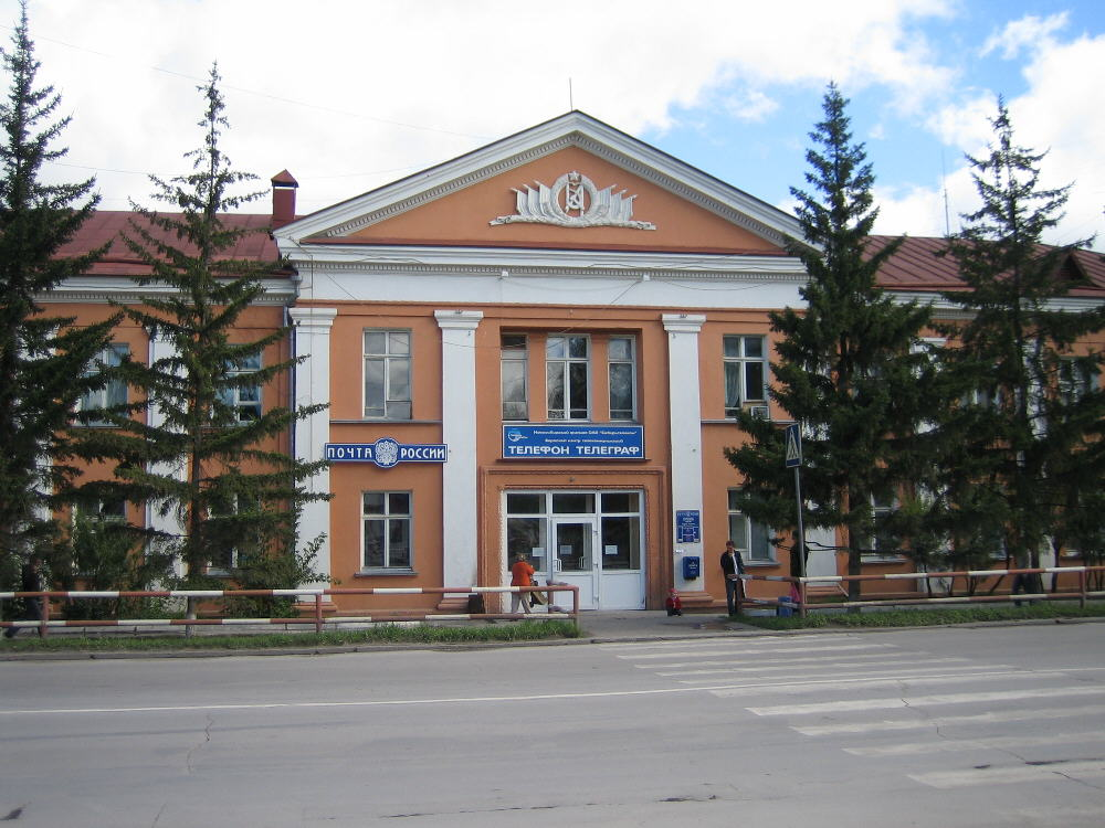 Post Office 633010, Berdsk, Novosibirsk Oblast, Russia (25.08.2007)